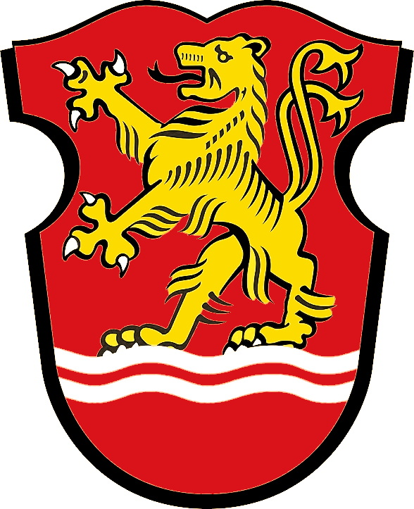 Wappen des Fleckens Lauenau, Deutschlandy